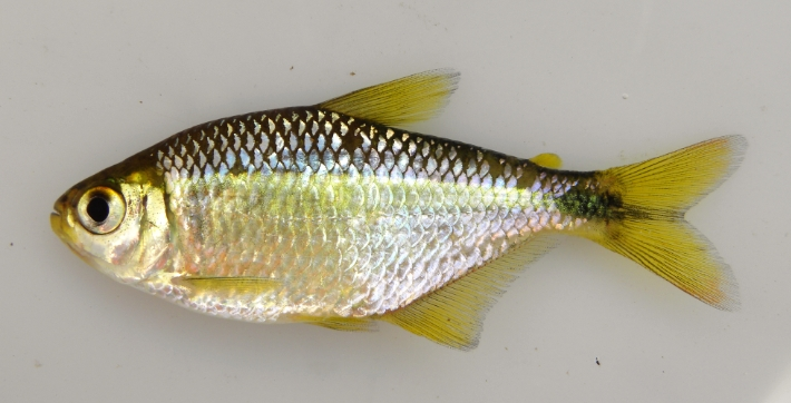 ejemplar del Río Arapey, Uruguay